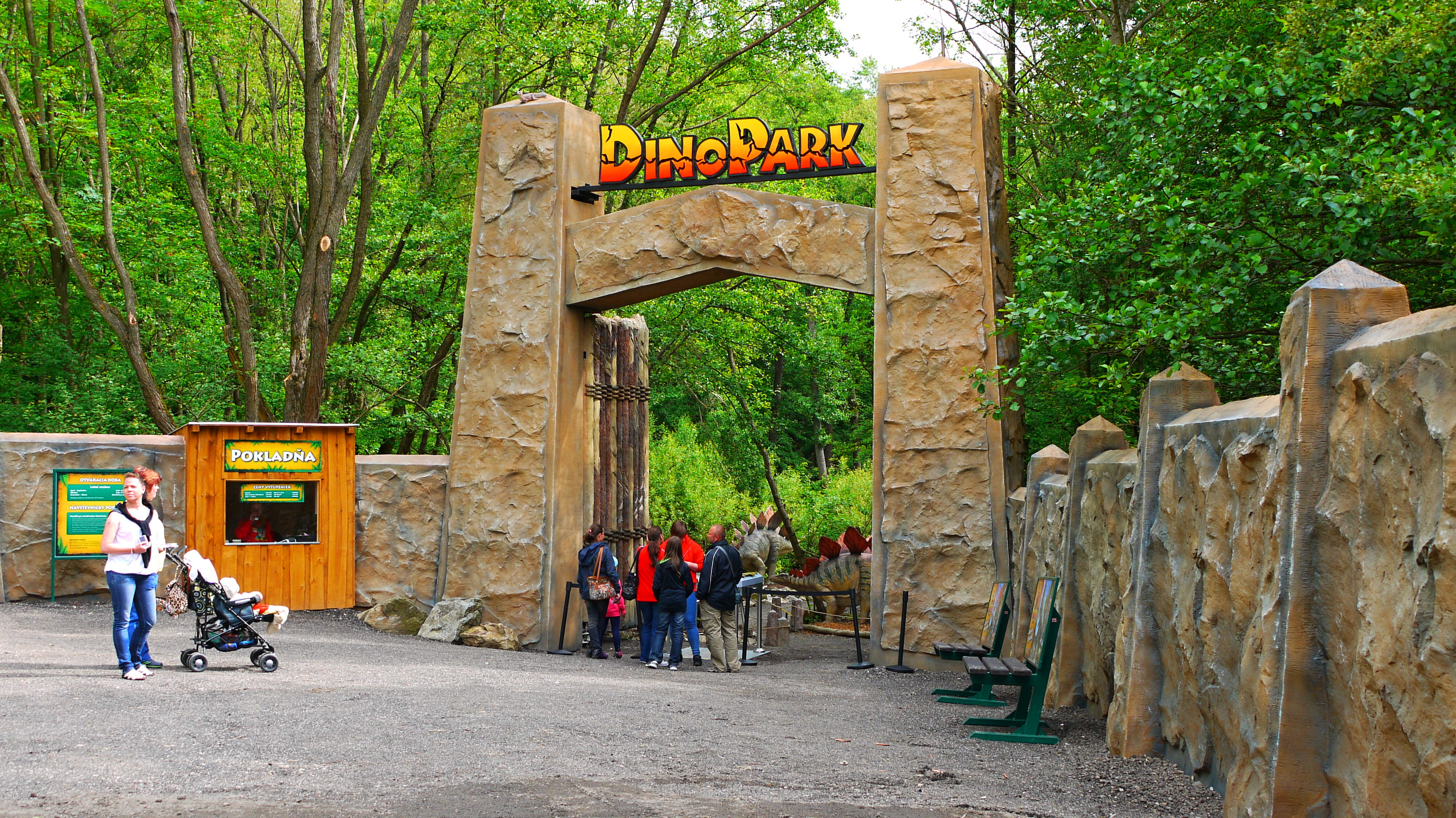 DinoPark Košice, Gate